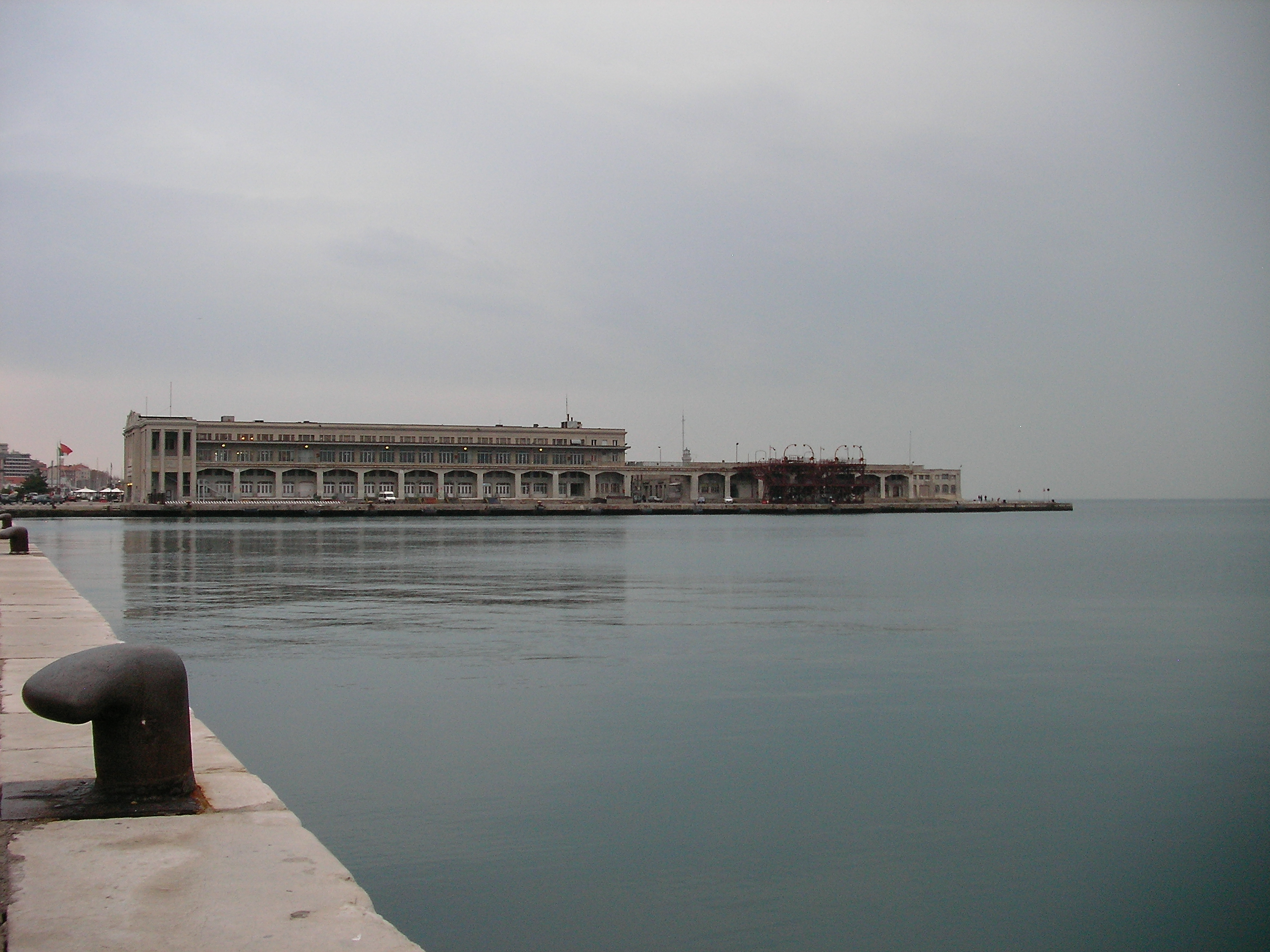 Molo i mare a Trieste